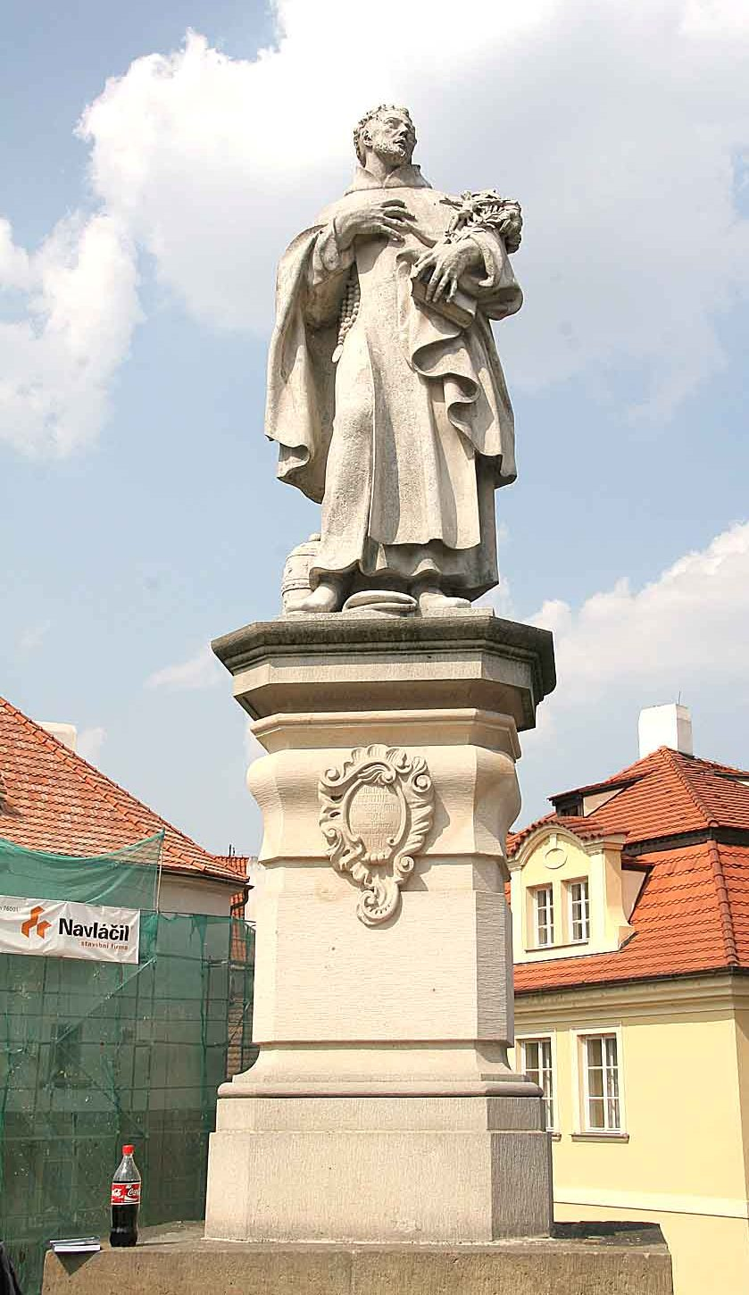 Česky: Sousoší Svatého Filipa Benicia na Karlově mostě